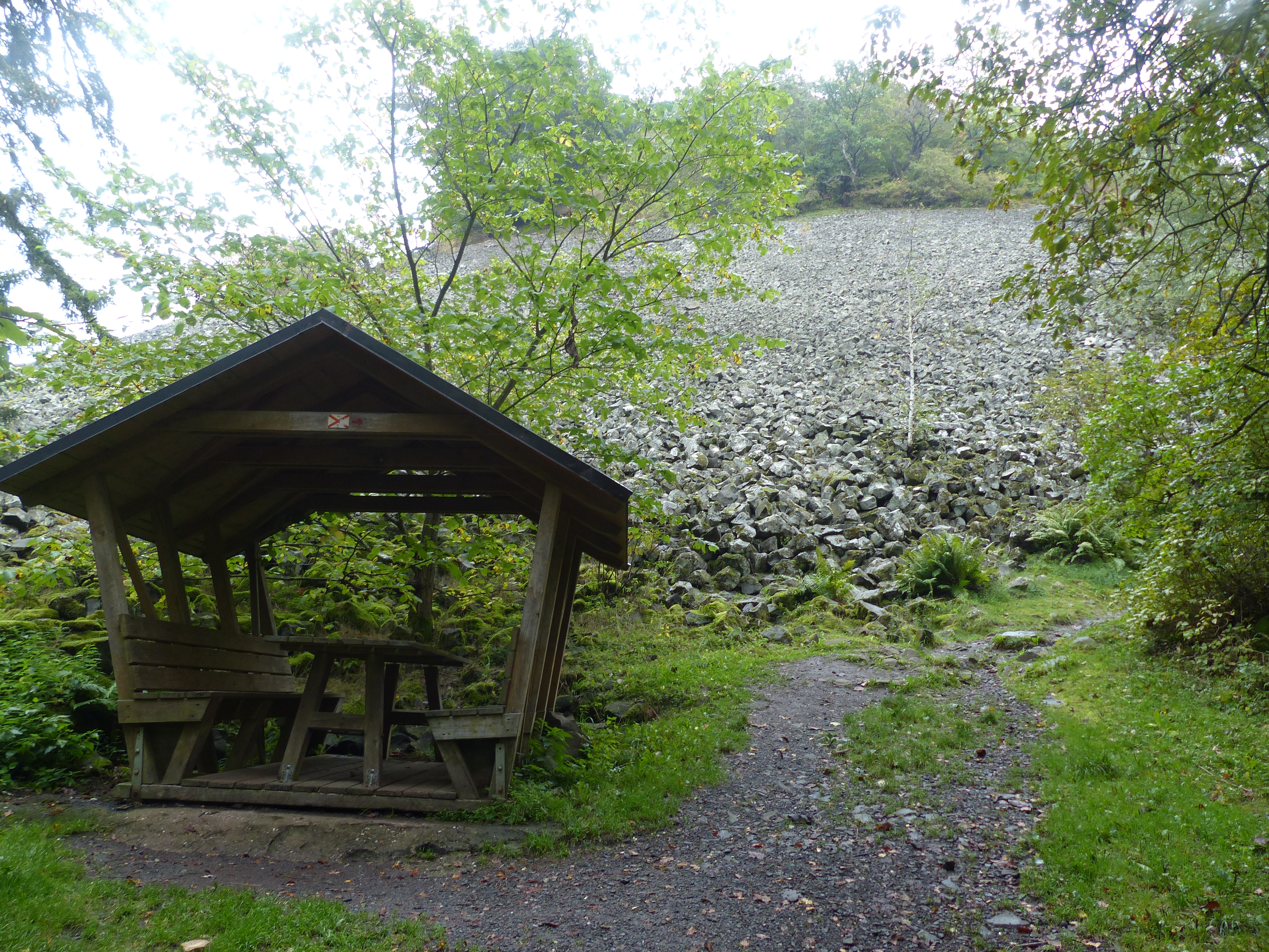 Rauher Kulm